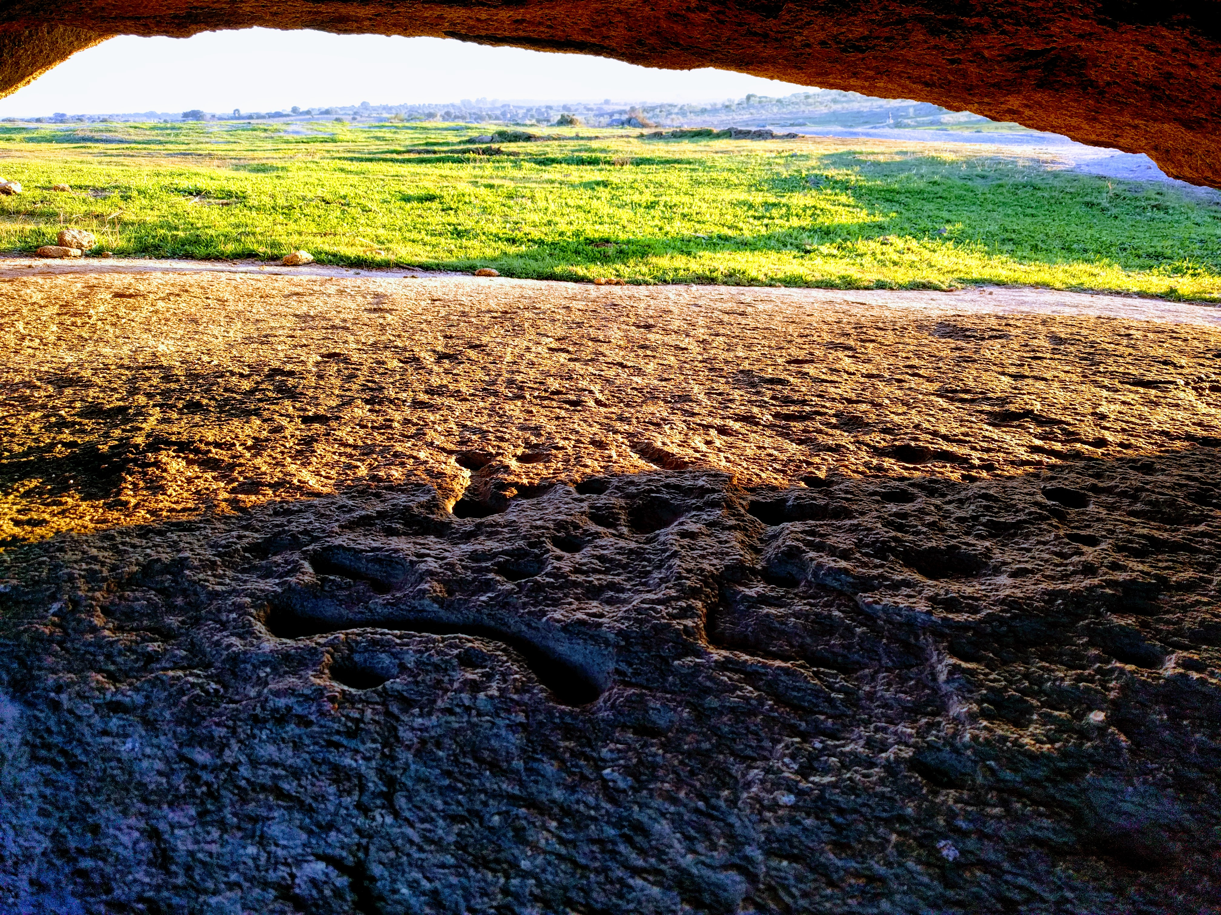 Grabados realizados sobre roca granítica en el interior de una cavidad. Se observan varias cazoletas unidas por tres surcos paralelos, uno de los cuales tiene una curiosa forma humana estilizada. "Los Barruecos" de Malpartida de Cáceres.